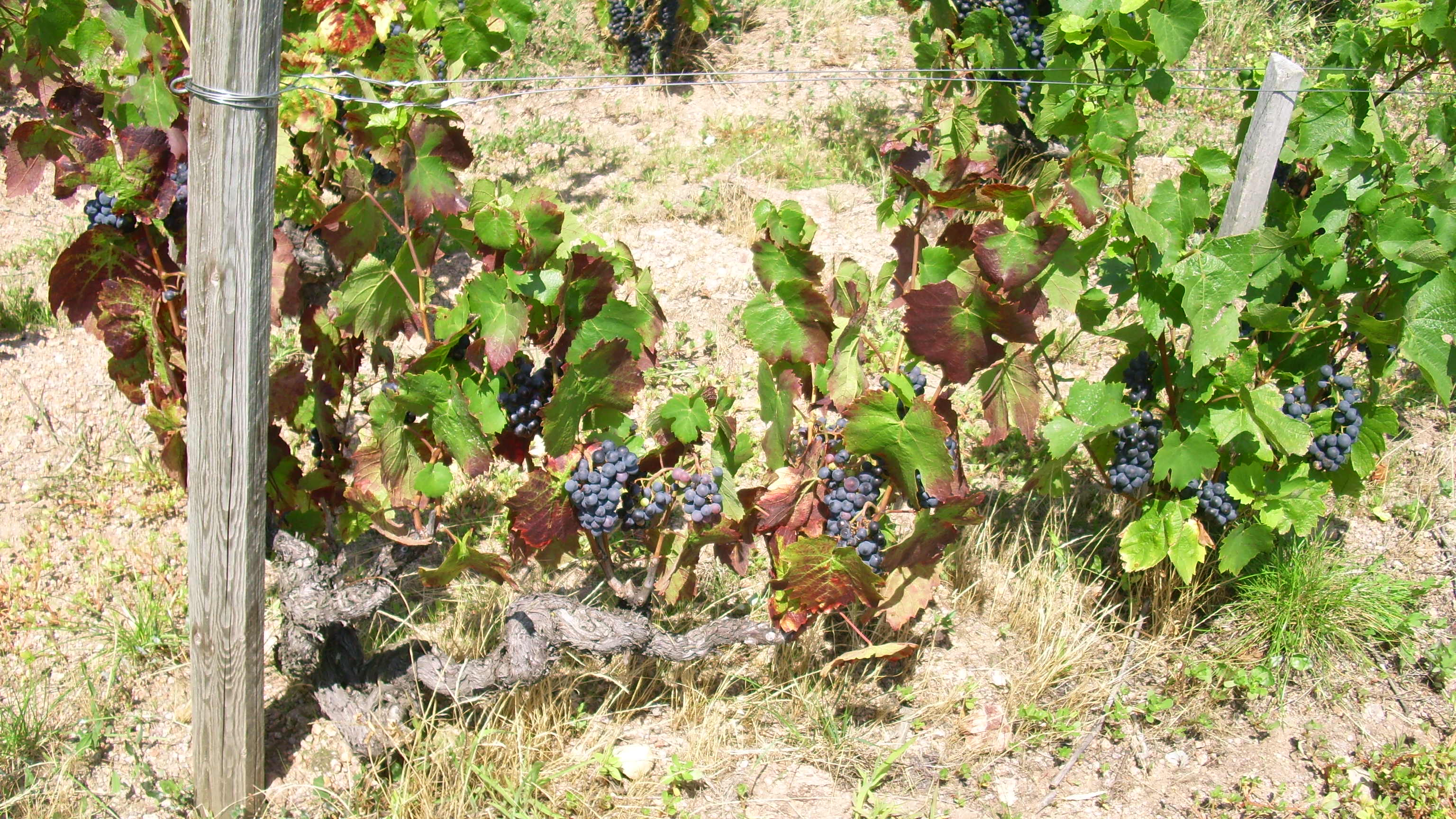 Pieds de vignes de l'appelation Moulin-à-Vent